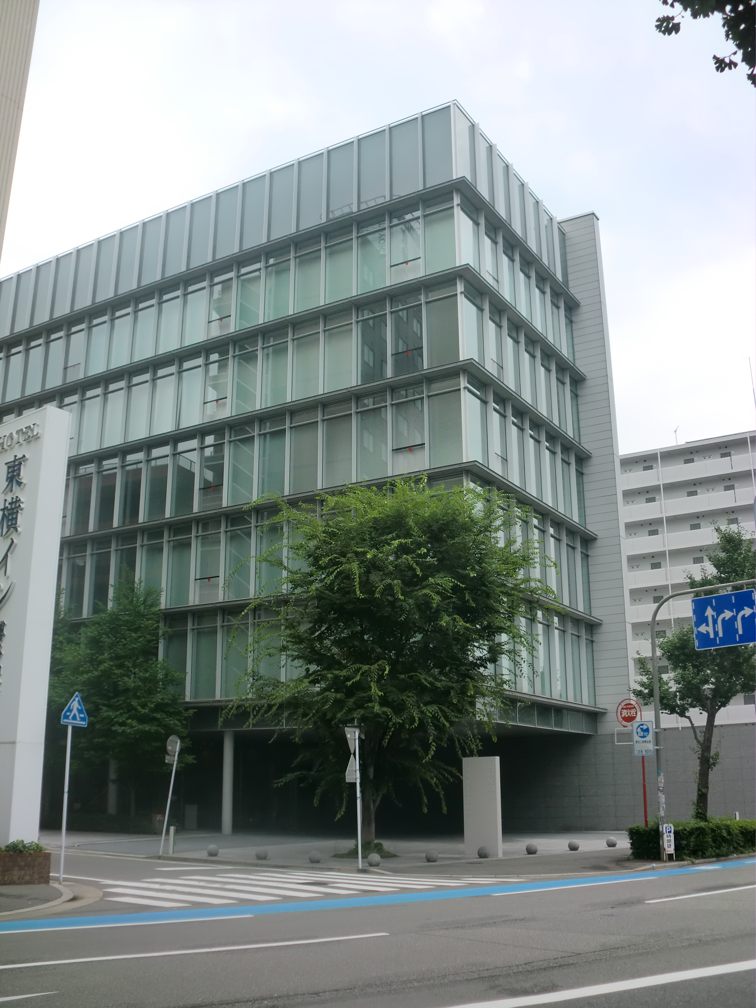 福岡市にある福岡メディカルセンター（福岡県医師会館）